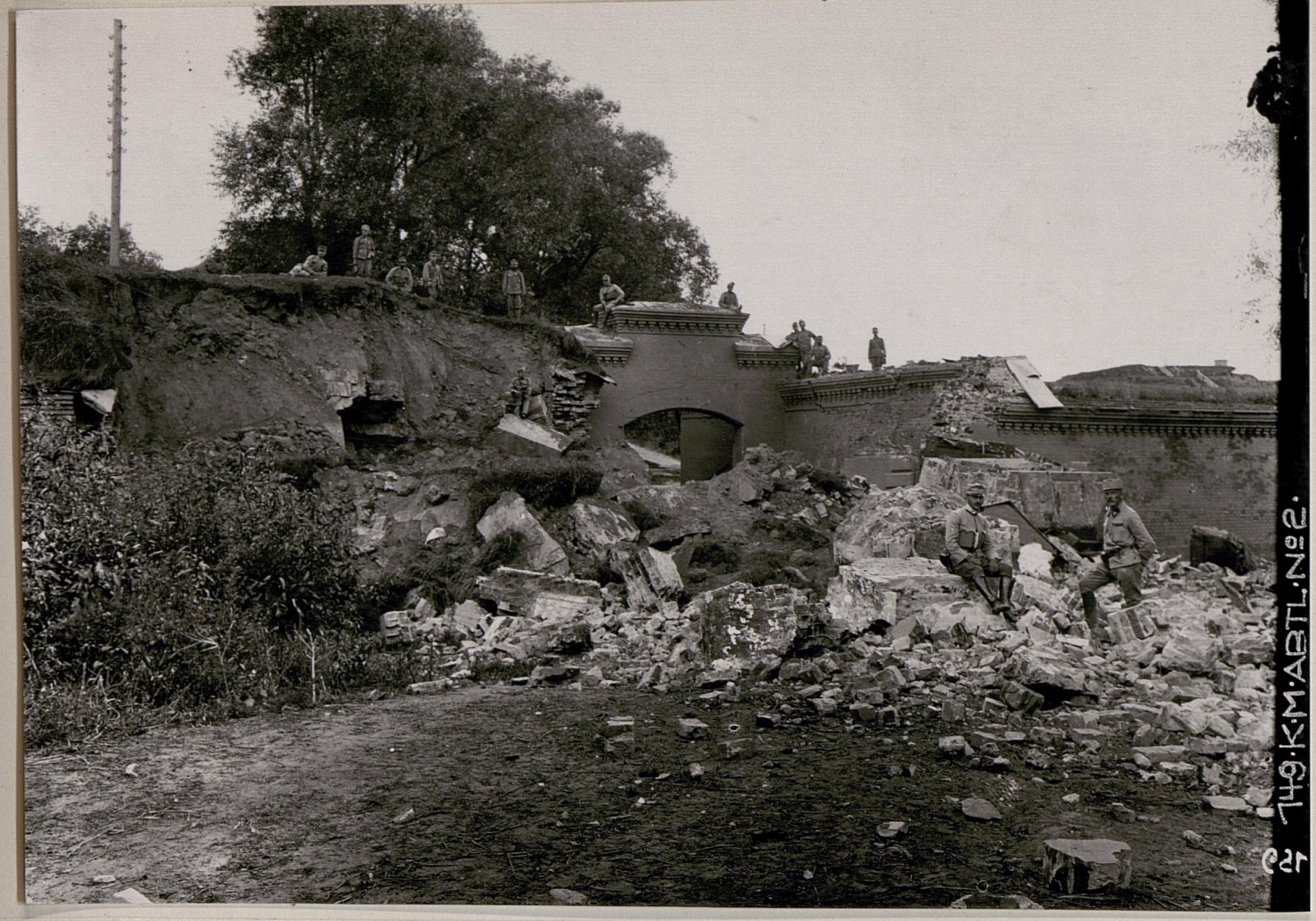 Iwangorod. Kehle des Forts "Wannowski". Äusseres Tor, gesprengt von den Russen am 4.8.1915 zwischen 2 und 5 Uhr vormittags. Aussenansicht